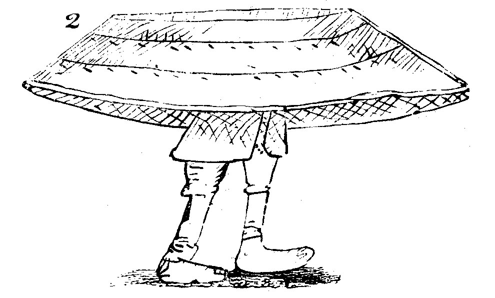 Boot tragender Lappländer gezeichnet von Linné in seinem Tagebuch der Lappländischen Reise (Iter Lapponicum)